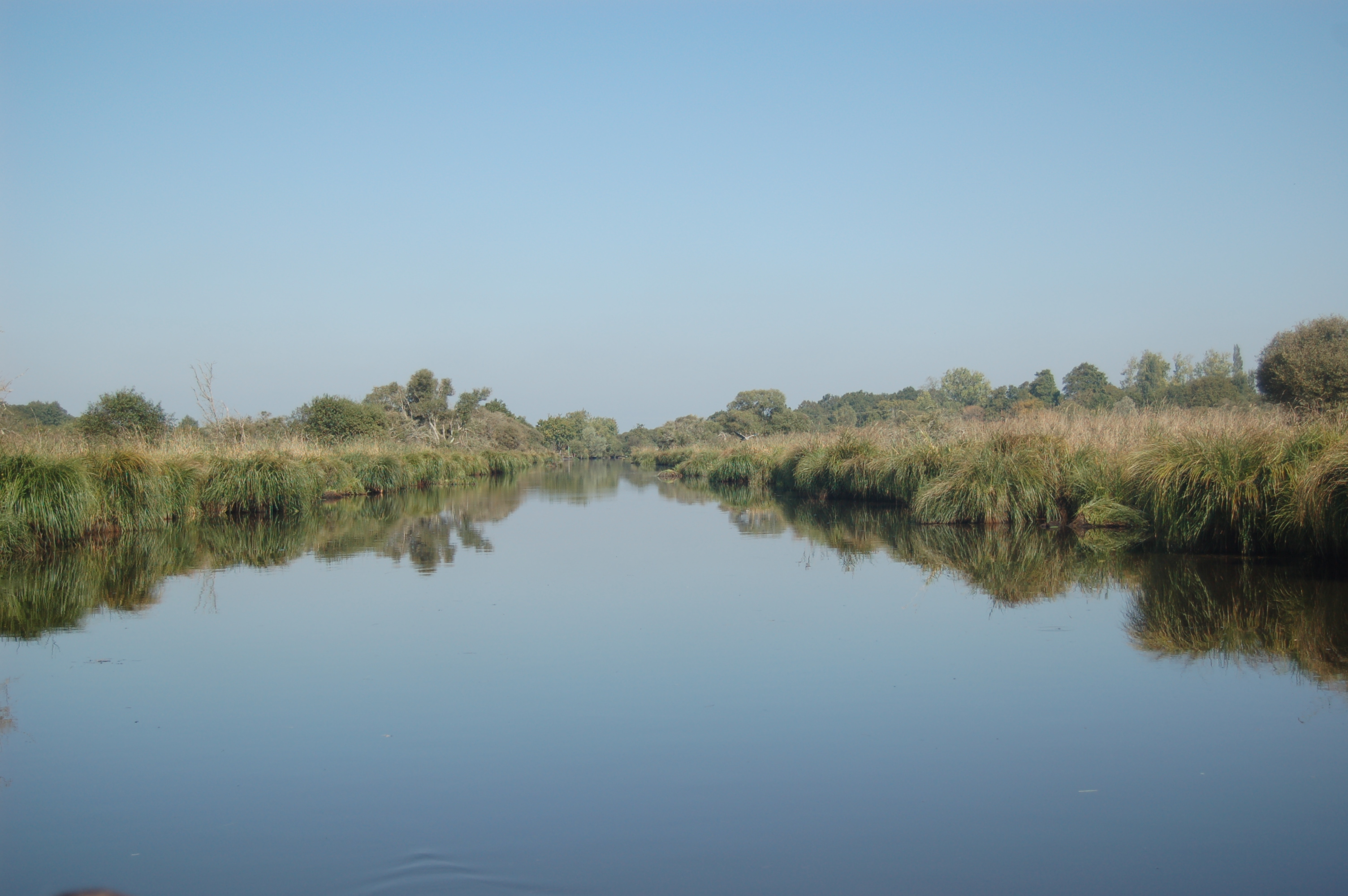 au fil du canal